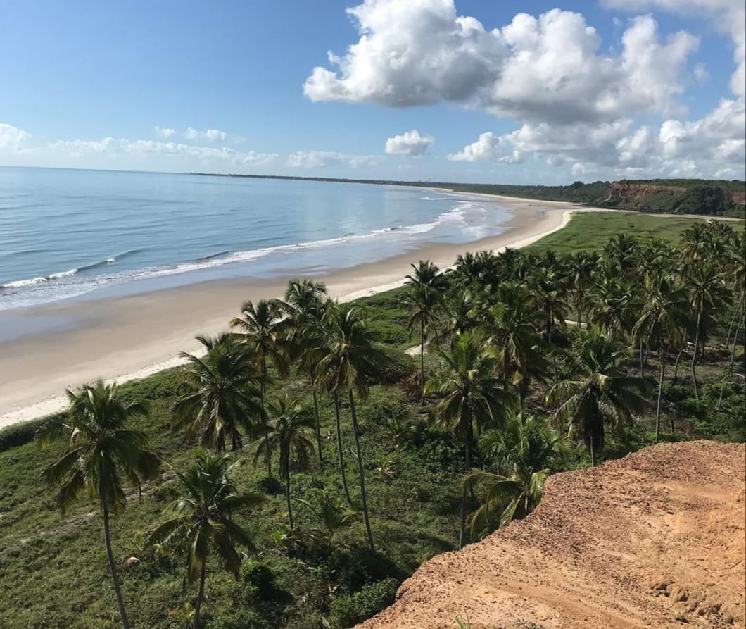 praia de campina Rio tinto paraiba